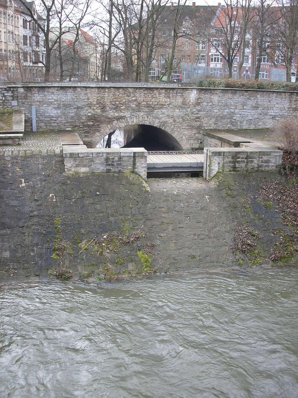 Der Düker der Schmalen Gera unter dem Flutgraben in Erfurt (Thüringen).